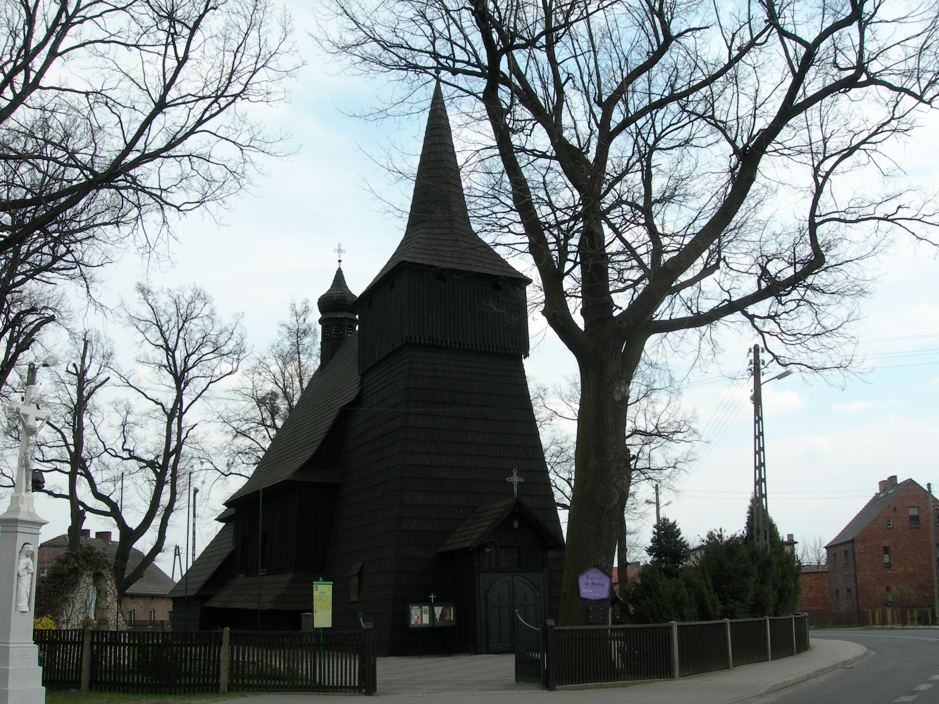 Kościół św. Mikołaja w Wilczy.